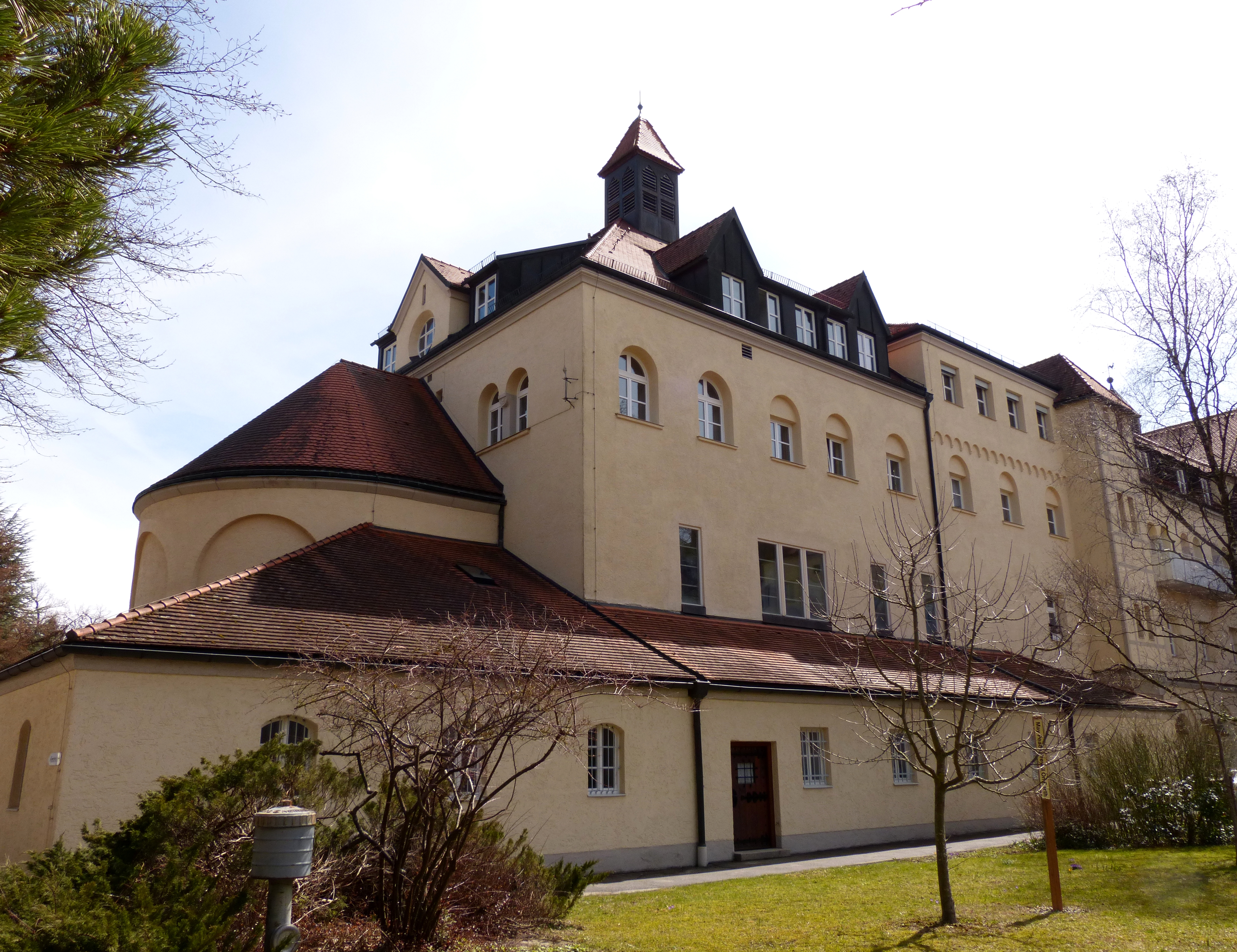 Tutzing, Bahnhofstraße 3, Kloster der Missionsbenediktinerinnen. Der historische Hauptbau mit Ecktürmen, Flügelbauten und Kapelle wurde 1903/04 von Max Kurz erbaut. Seit 1945 befindet sich in einem Teil des Gebäudes das örtliche Krankenhaus. This is a photograph of an architectural monument.